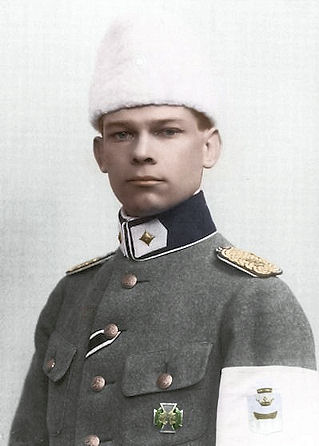 Jääkärimajuri Unio Sarlin